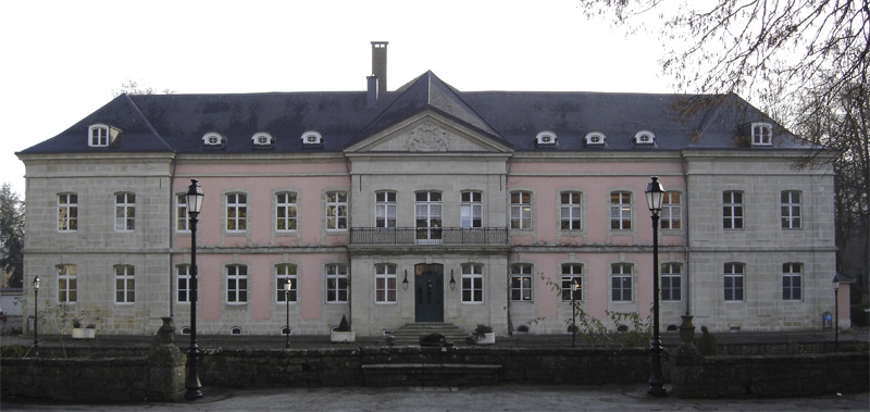 La maison de repos de Differdange (Luxembourg), une ancienne abbaye